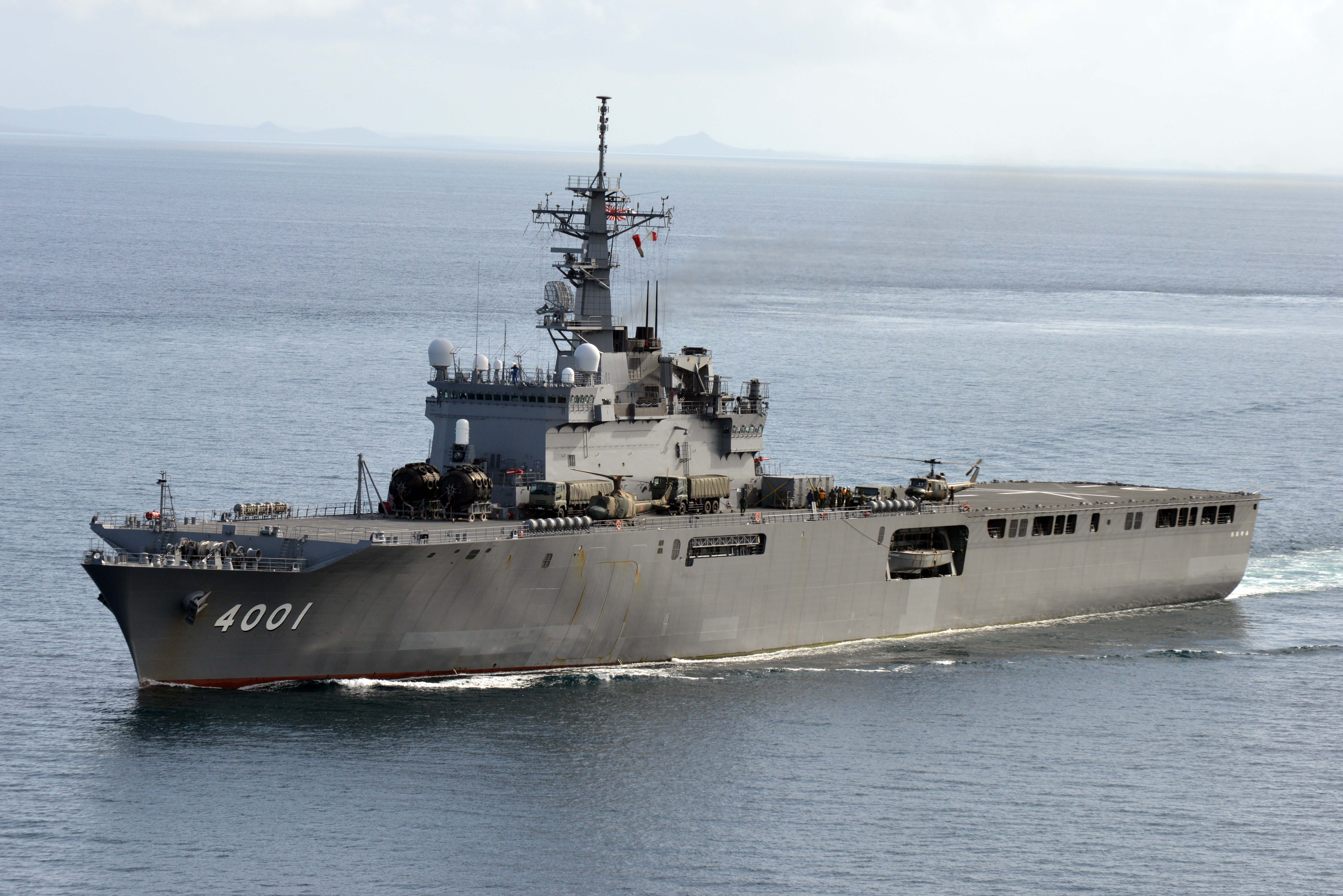 LST-4001 おおすみ